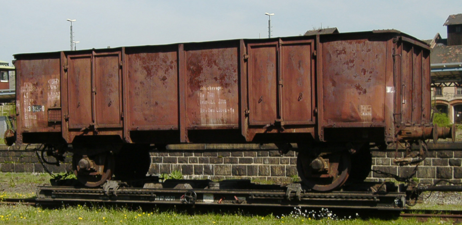 Offener Güterwagen, Gattung El, ähnlich dem UIC-Typ 1 für zweiachsige E-Wagen, zuletzt verwendet als SchlackewagenClass El open wagon, similar to the UIC type 1 for twin-axled E wagons, being used as an ash wagon.